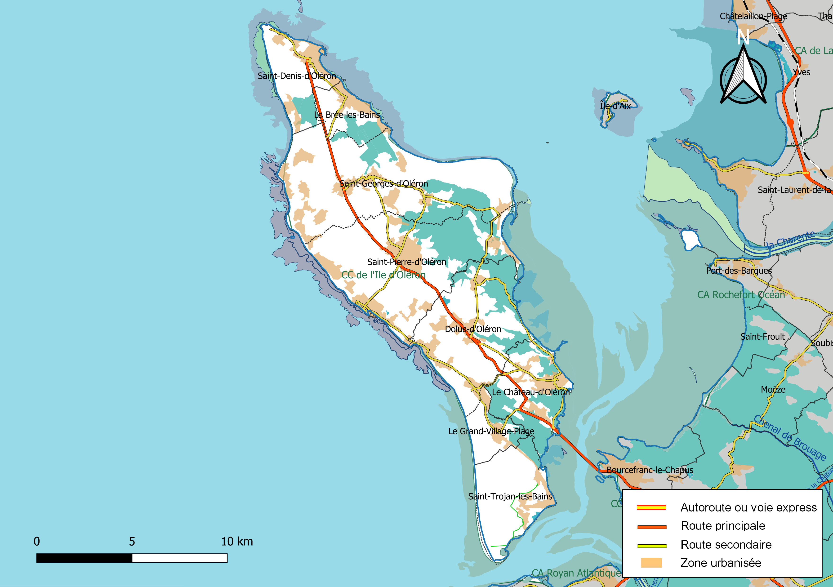 Carte géographique de la Communauté de communes de l'Île-d'Oléron, département de la Charente-Maritime, France. Composition au 1er janvier 2019.